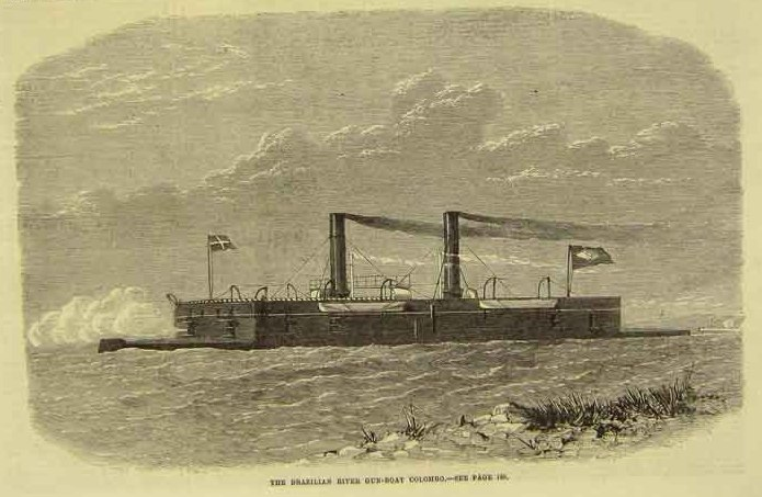 Encouraçado Colombo (1885-1880), pertencente à Marinha Imperial do Brasil.